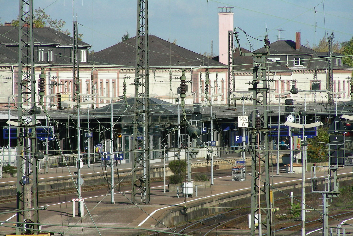 Bahnhof Offenburg von Friedrich Eisenlohr